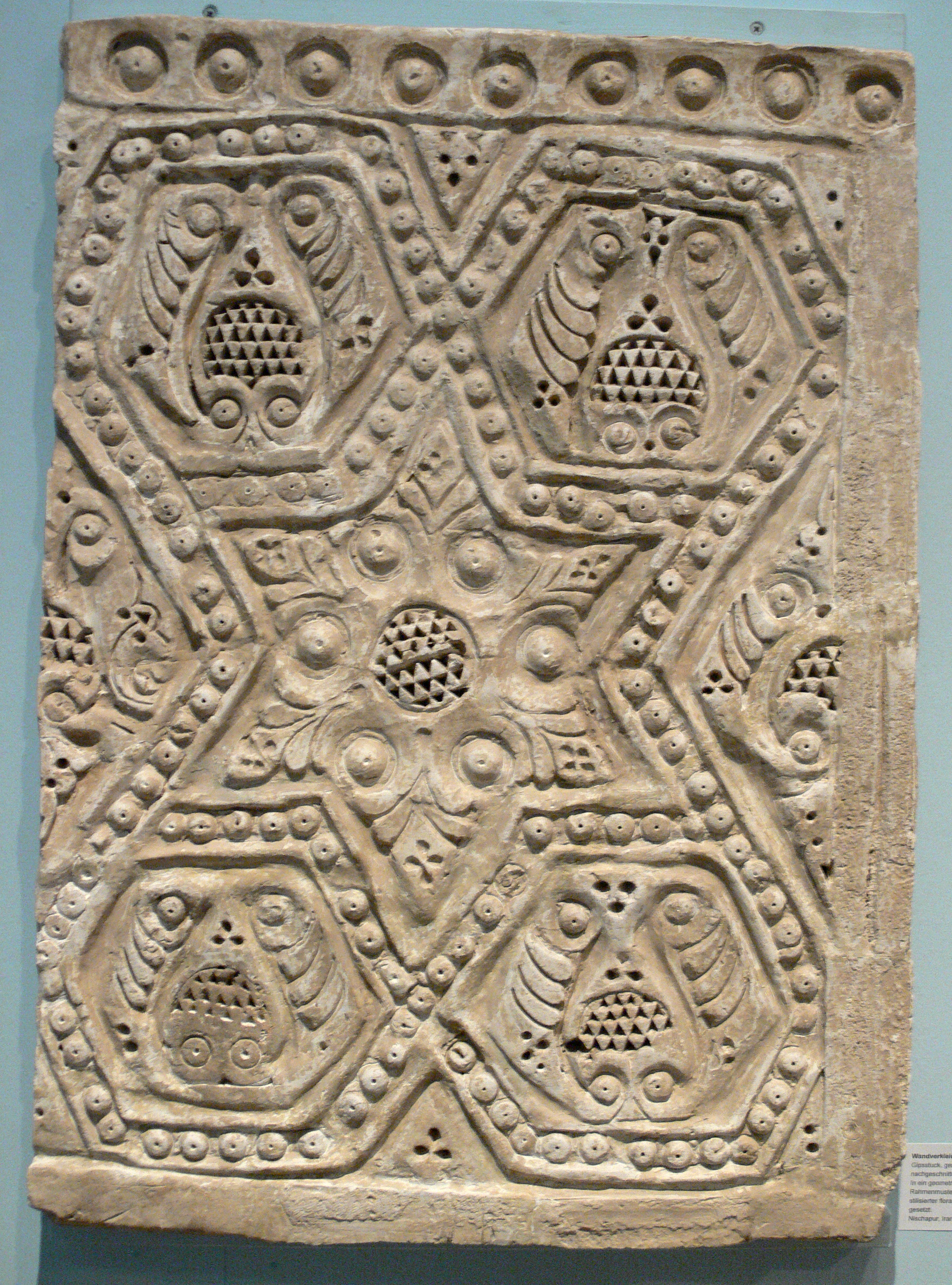 Wandverkleidung aus Nischapur, Iran, vor 1220; Gipsstuck gemodelt und nachgeschnitten Linden-Museum, Stuttgart